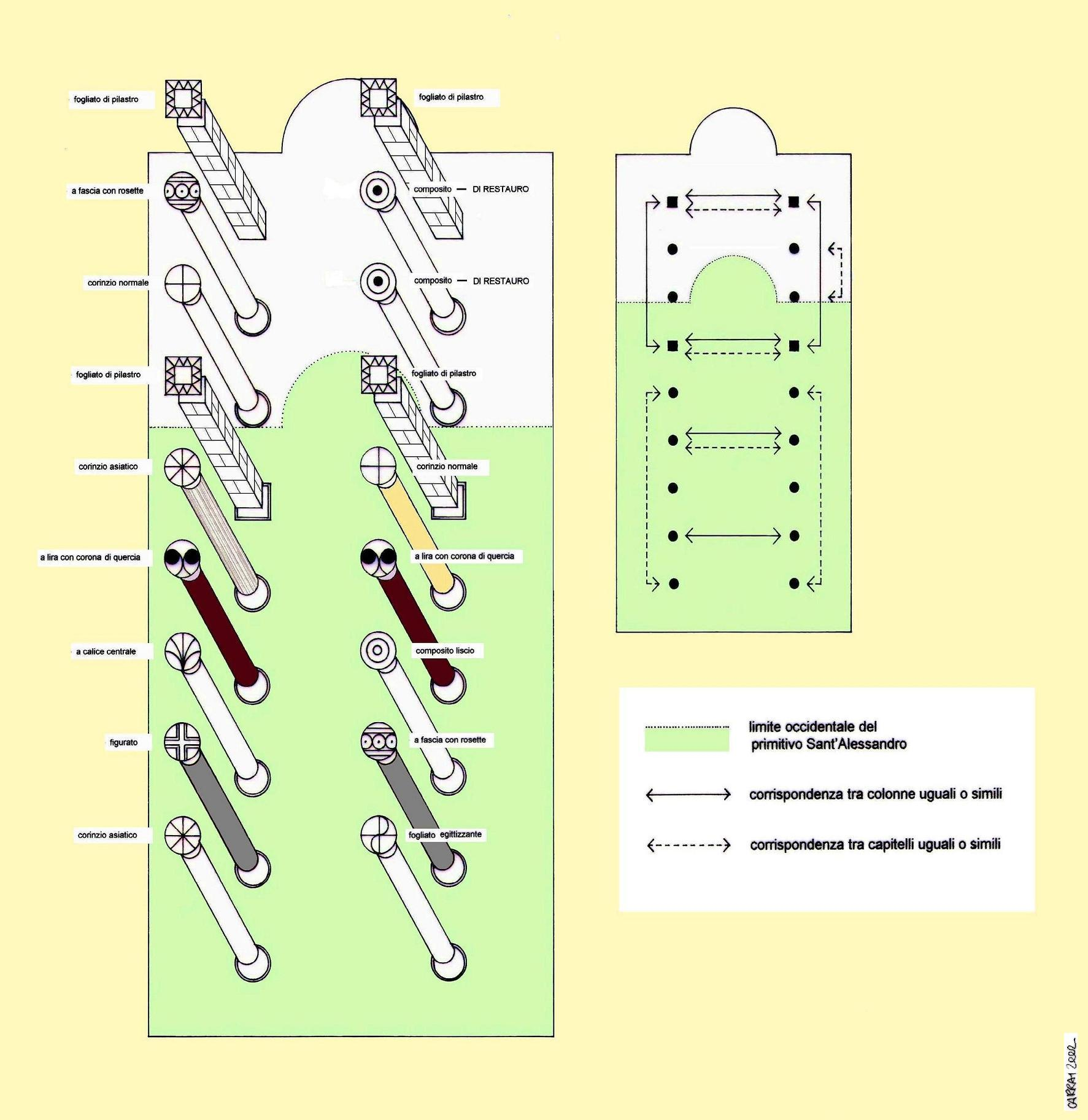 Come nelle più antiche basiliche cristiane anche nel Sant'Alessandro i disparati materiali impiegati non sono disposti a caso, ma secondo un ordine volto ad evidenziare le diverse aree funzionali. Nella parte più antica (in verde) lungo la navata si alternano colonne di marmi chiari e scuri; l'inizio del primitivo presbiterio era segnalato dalla coppia di colonne di granito rosso e dalla relativa coppia di capitelli a lira con corona di quercia; l'area dell'altare, in origine ad una quota più alta, era segnalata dalla prima coppia di pilastri e dai relativi capitelli uguali. La parte più recente (in bianco) ripete con materiali più poveri lo schema precedente ampliandolo.